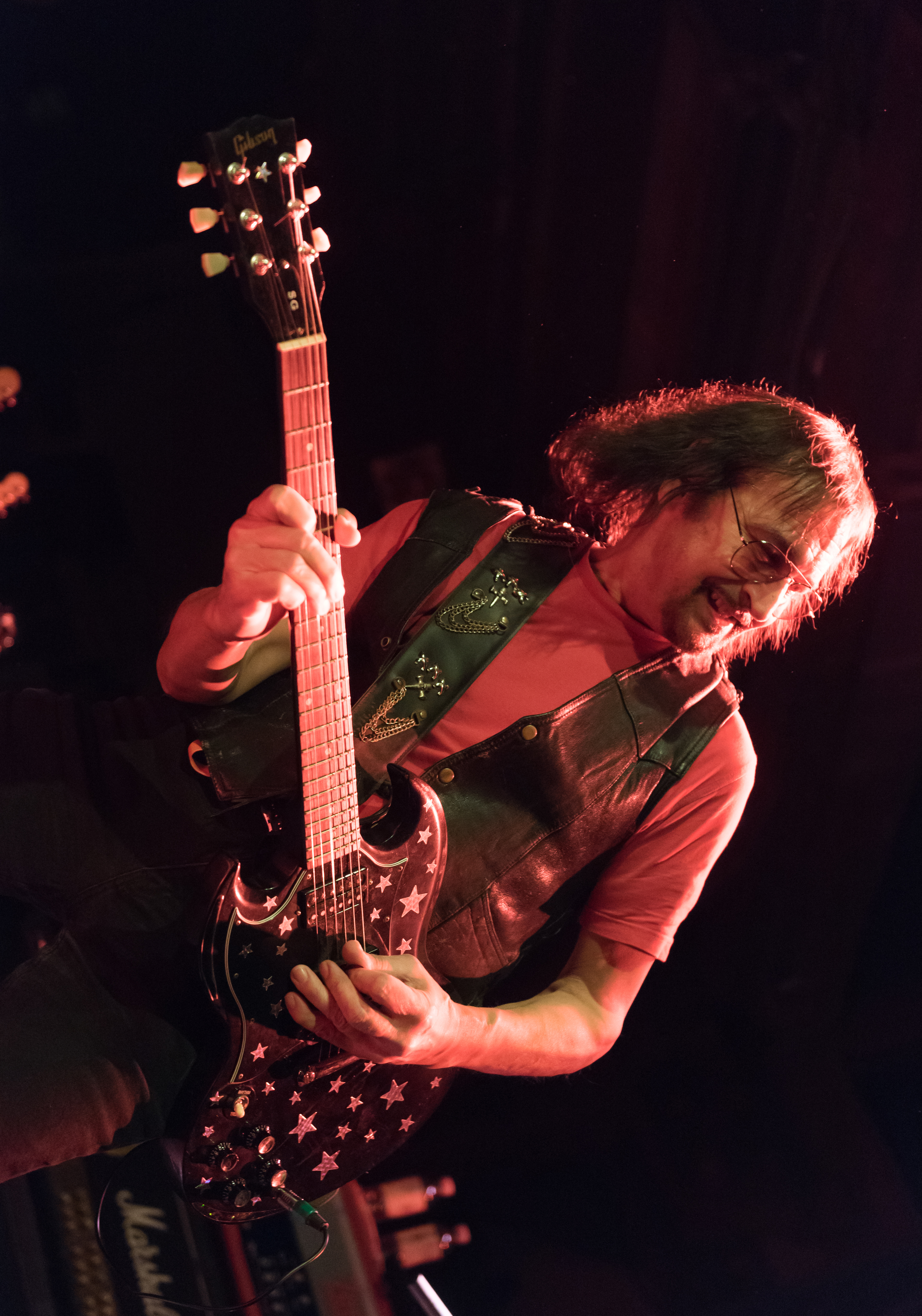 Hannes Bauer's Orchester Gnadenlos live in der Fabrik Hamburg 2017